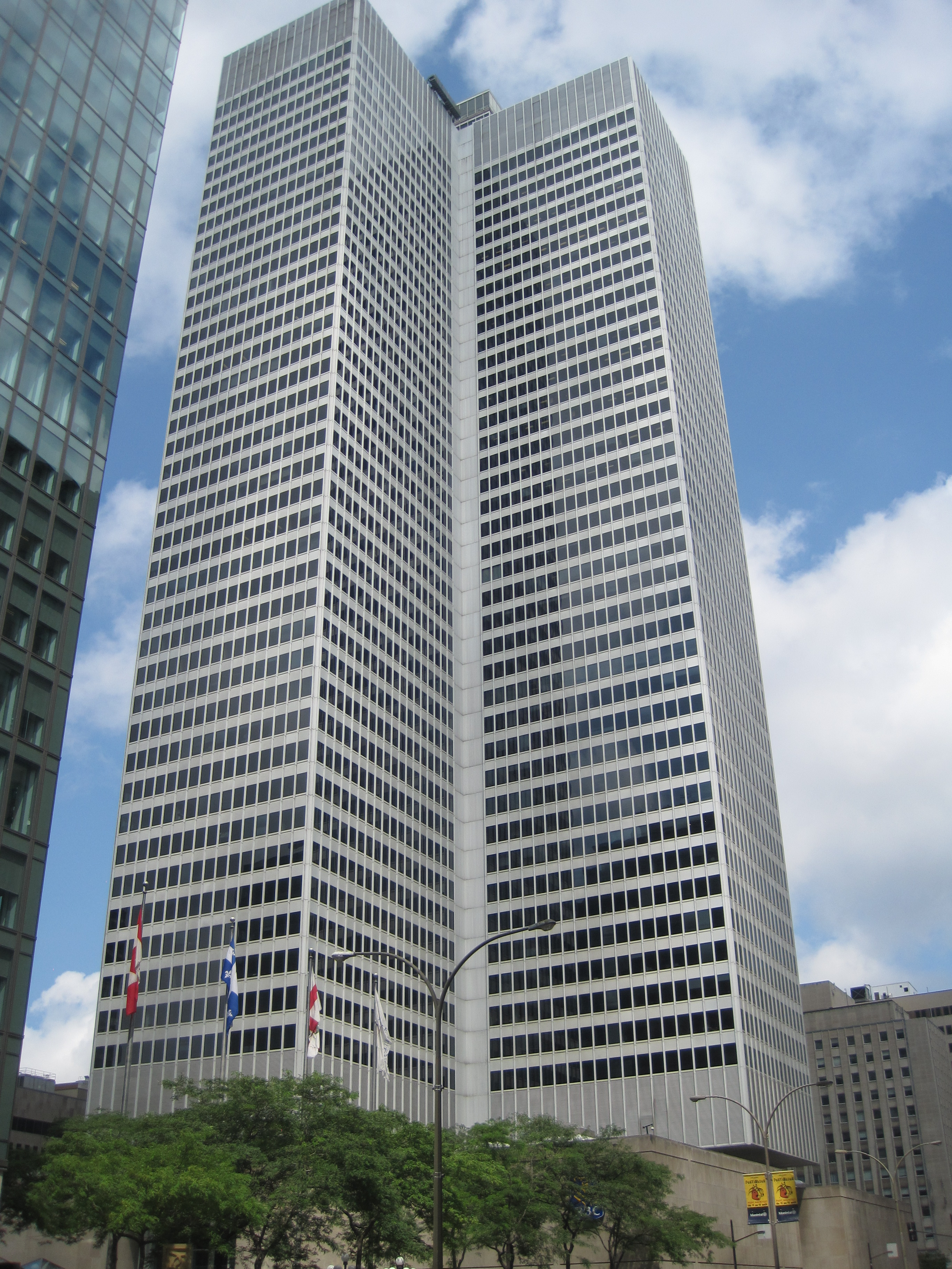 La Place Ville-Marie, vue du boulevard René-Lévesque